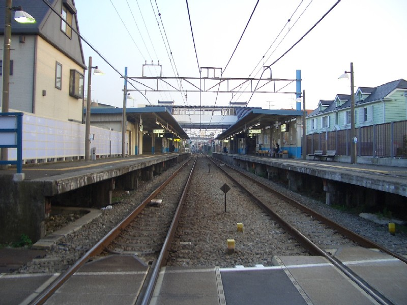 Kugenuma-Kaigan Station platforms, on the Odakyu Enoshima Line, Fujisawa, Kanagawa 鵠沼海岸駅